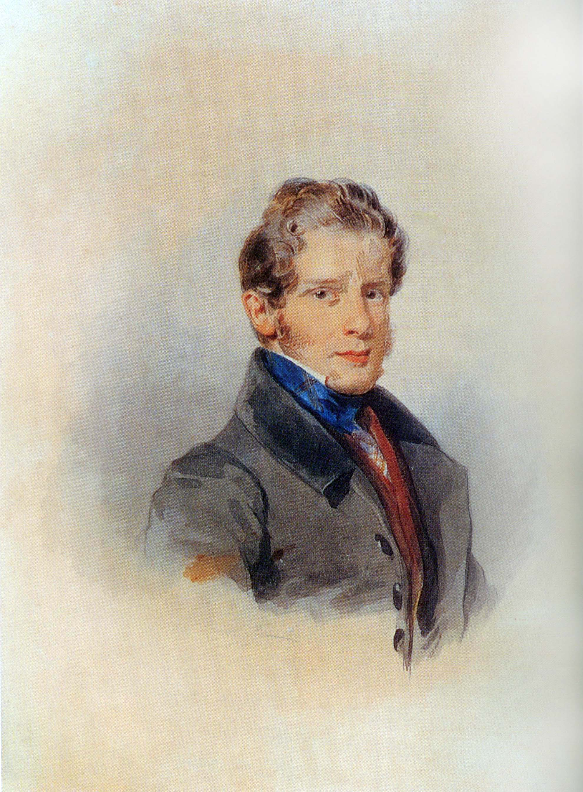 Александр Григорьевич Демидов (1803-1853), чиновник, старший сын Г.А.Демидова.